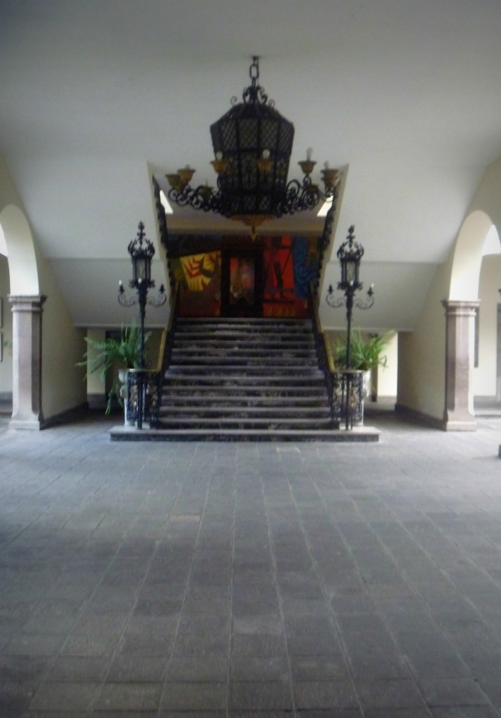 Corredor entrepatios y Escalera de Honor del Palacio de Carondelet